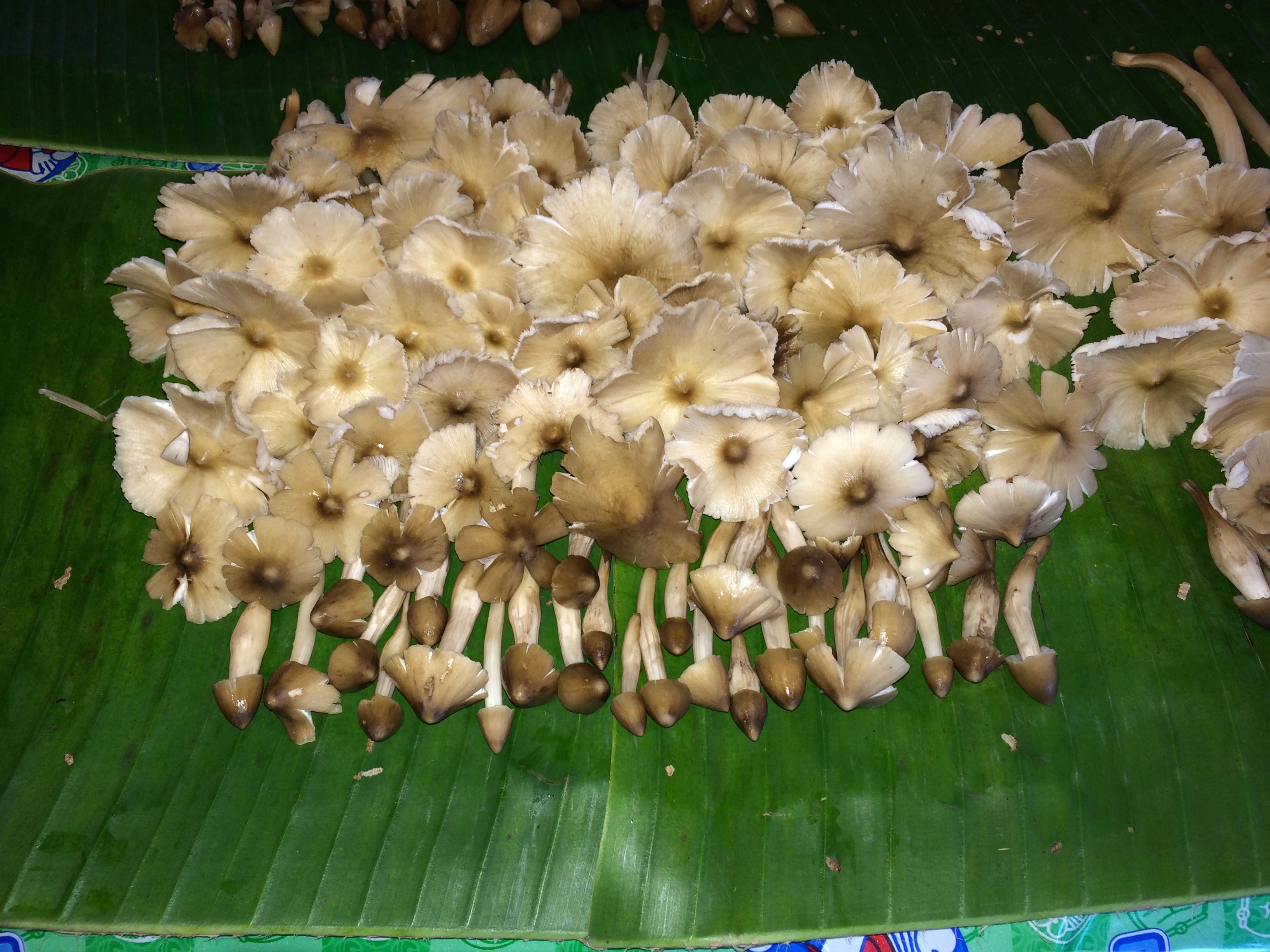 Termitomyces fuliginosus Heim